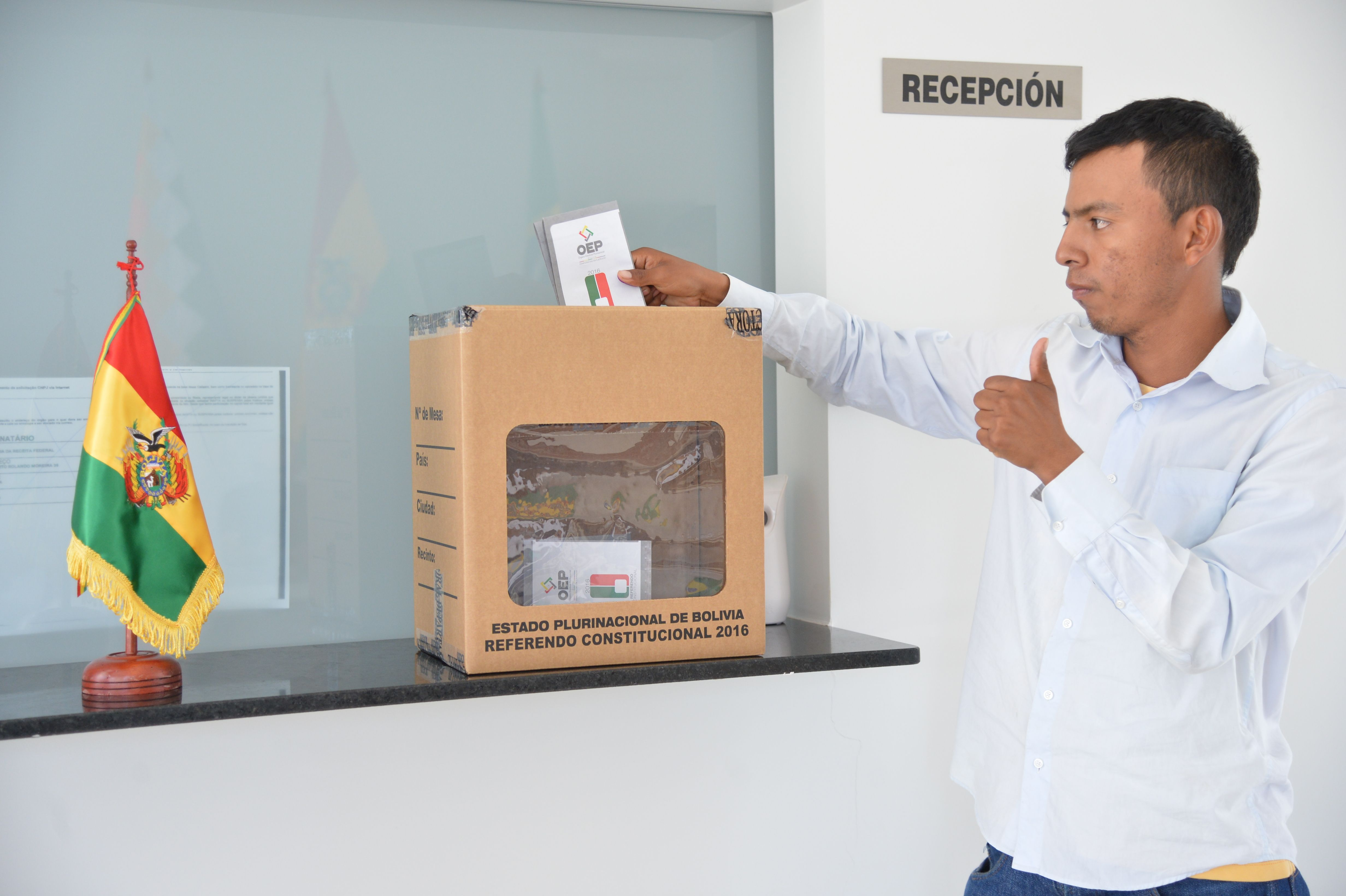 Brasília - O boliviano Gerson Antonio Chvistofev Valero, votando na Embaixada da Bolívia em Brasília no referendo constitucional para decidir se o presidente Evo Morales pode ser novamente candidato à reeleição.